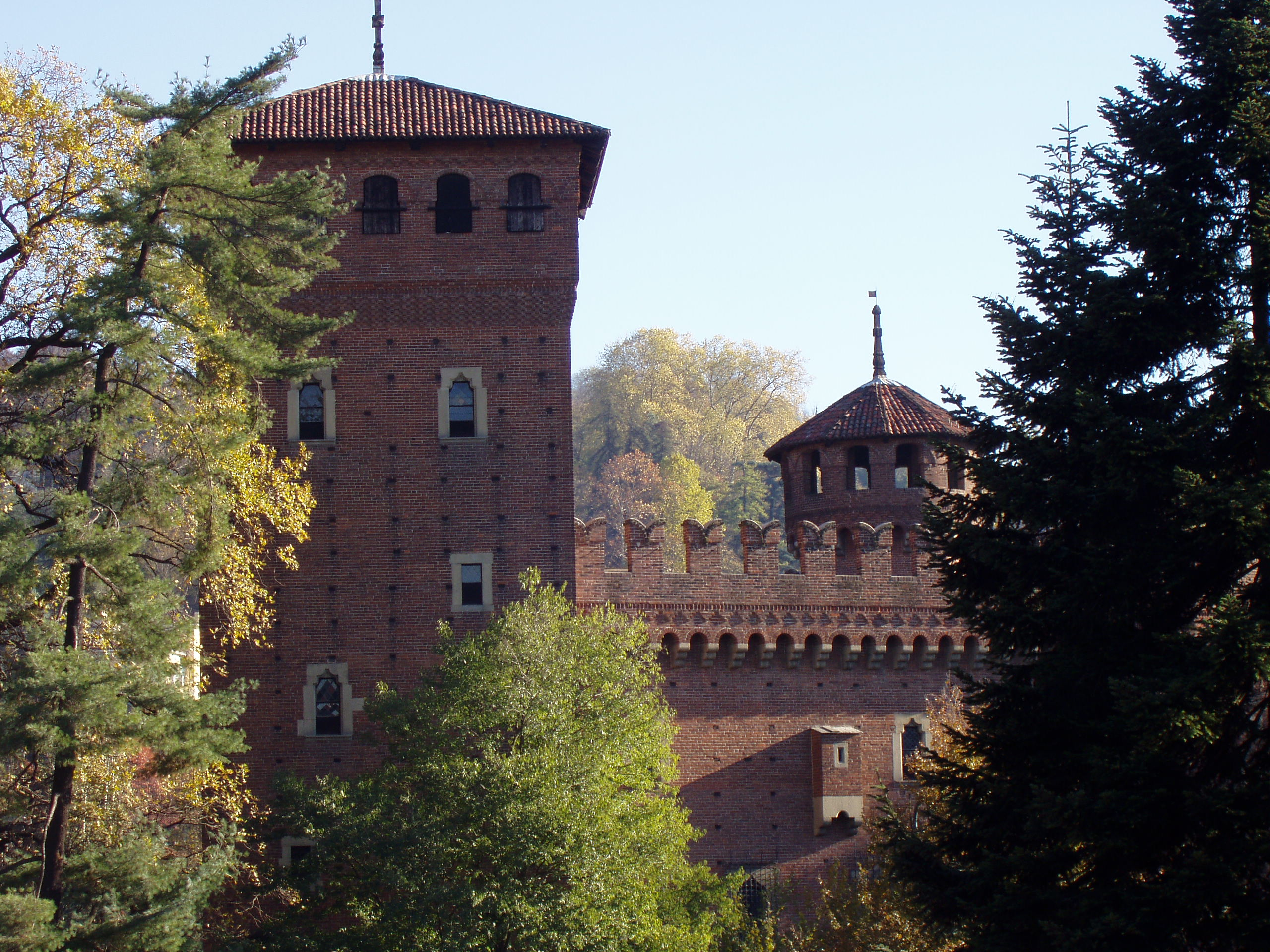 Castello del Borgo Medioevale di Torino